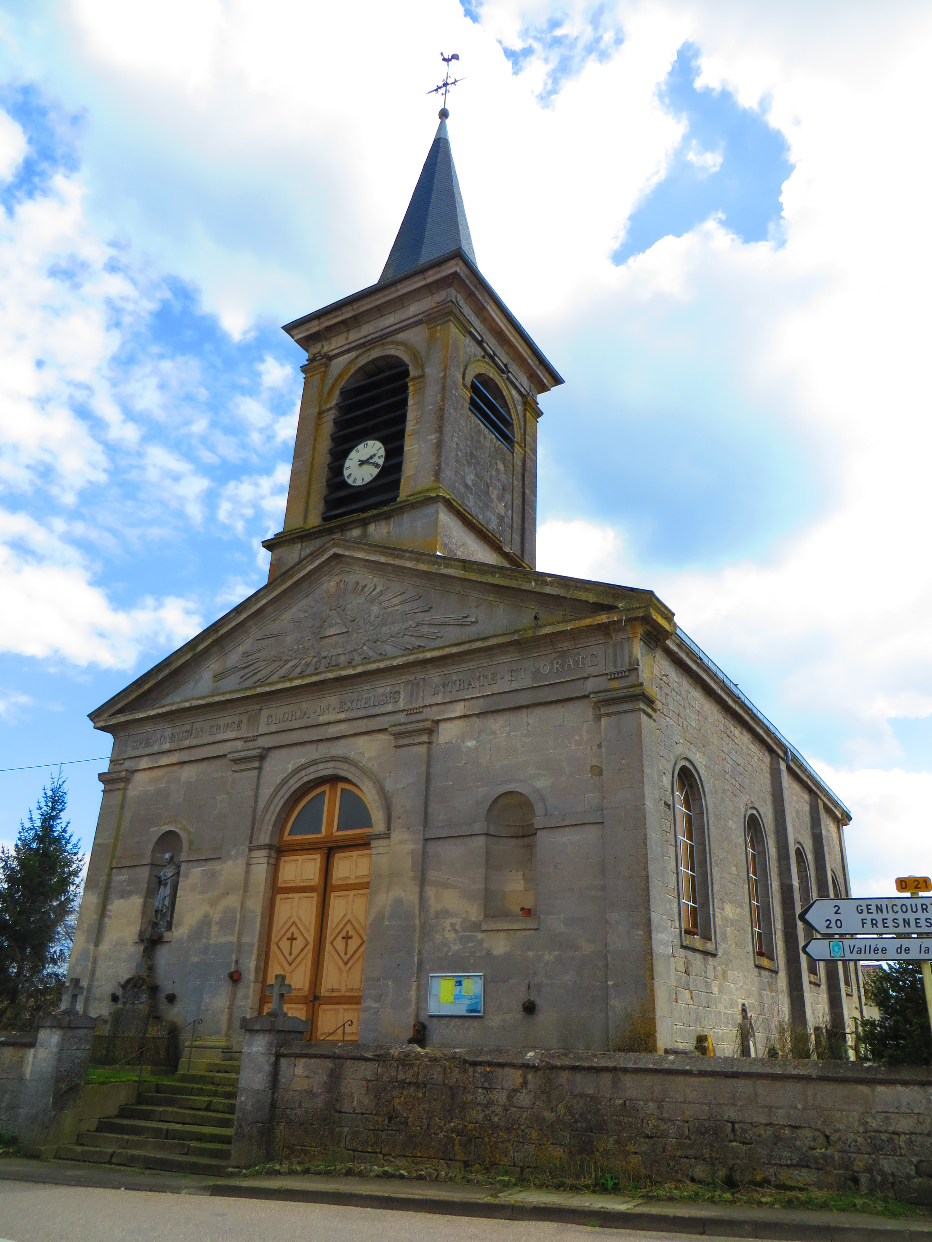 Villers-sur-Meuse L'église Saint-Vanne